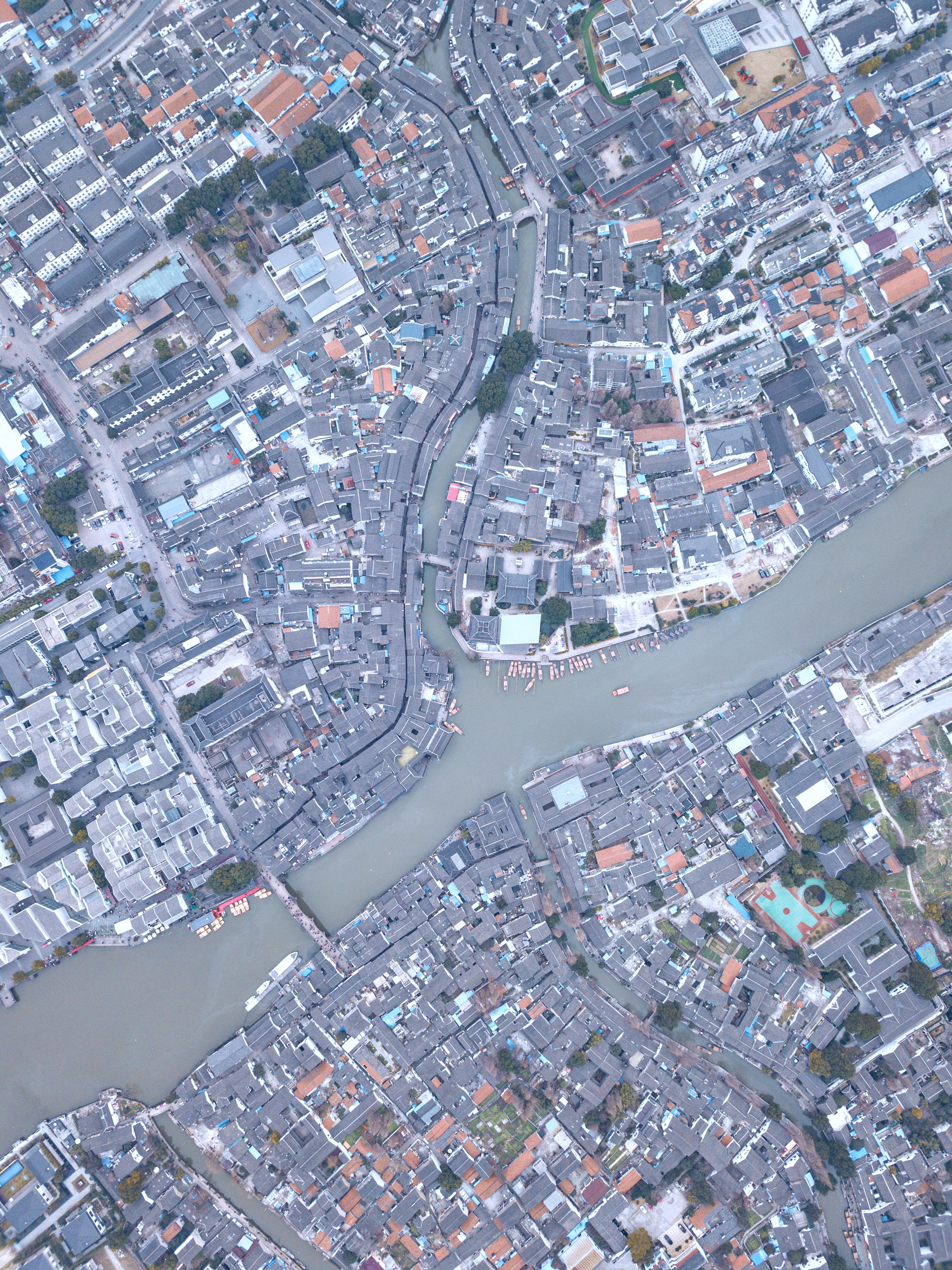 中文（中国大陆）: 朱家角放生桥附近的俯拍图，高程500米